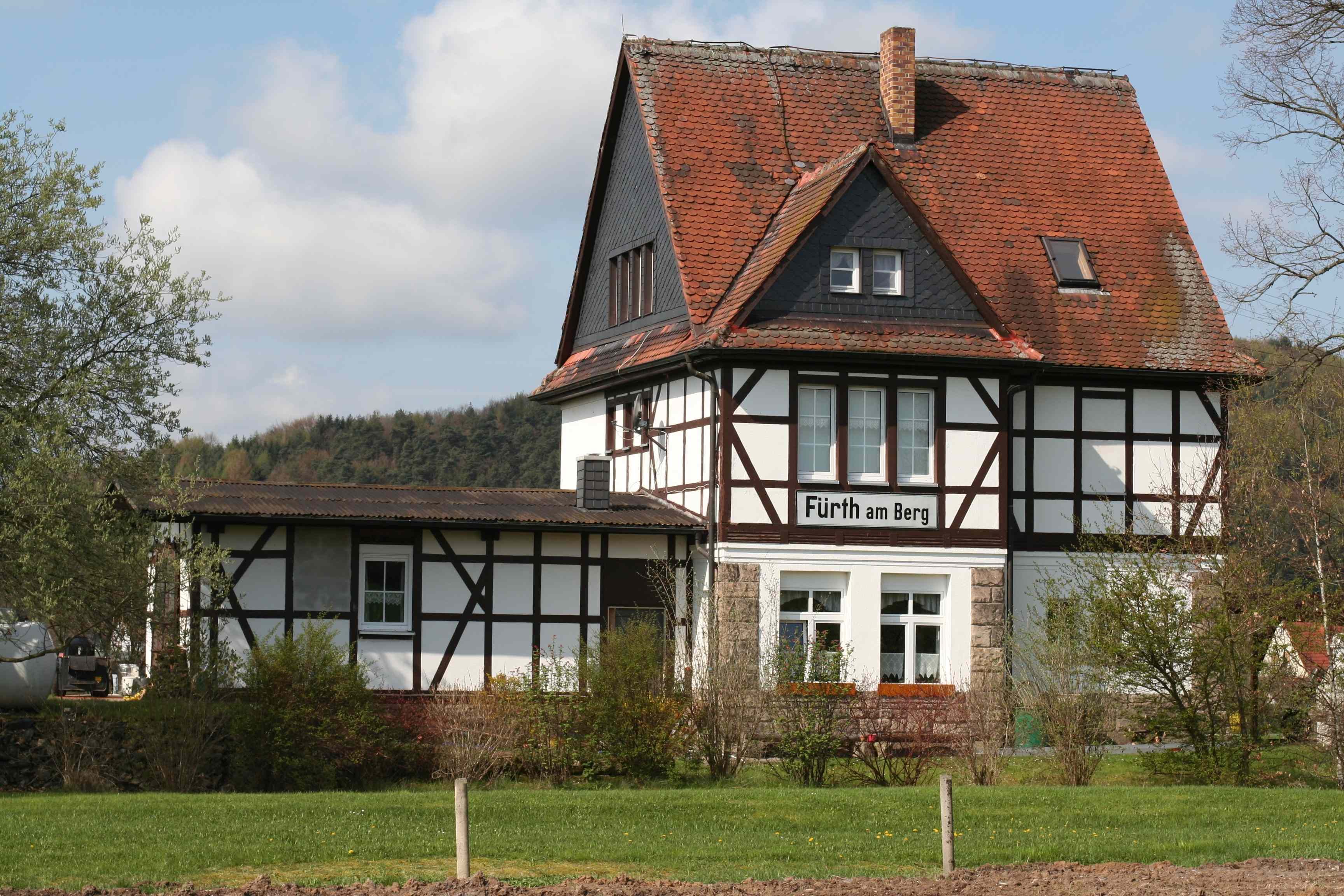 Bahnhof Fürth am Berg ehemaliger Bahnhof Fürth am Berg im Landkreis Coburg